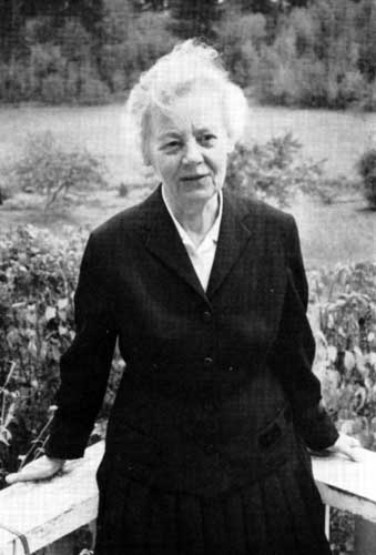 Tora Dahl